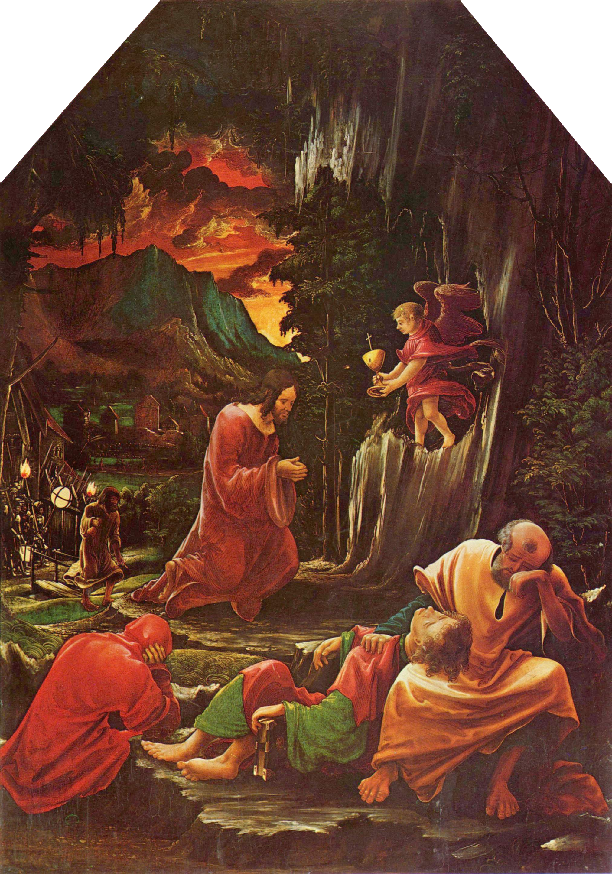 linker Innenflügel zur Passion Christi, Szenen oben links: Christus am Ölberg